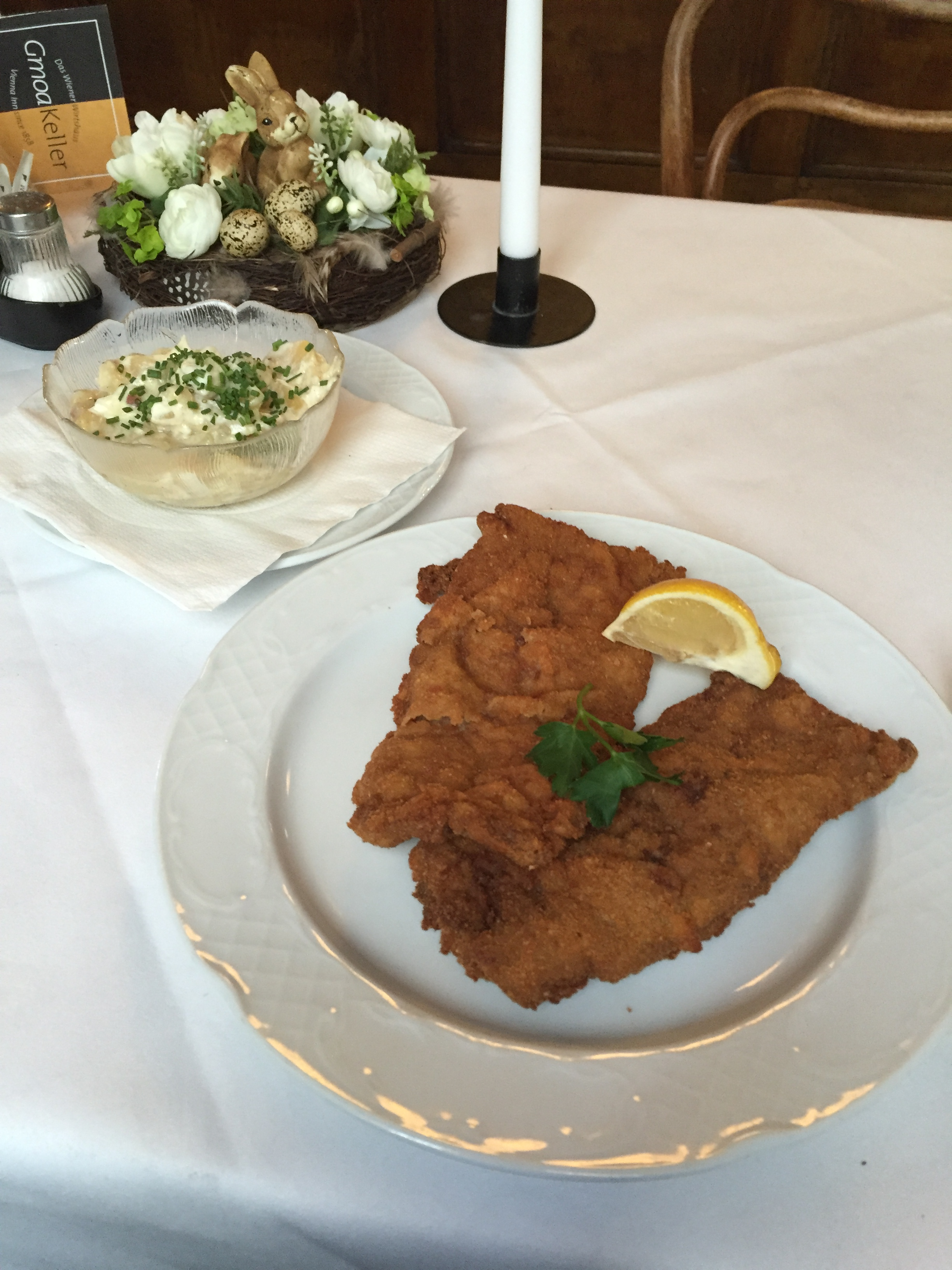 Gebackene Leber mit Mayonnaisesalat im Gmoakeller